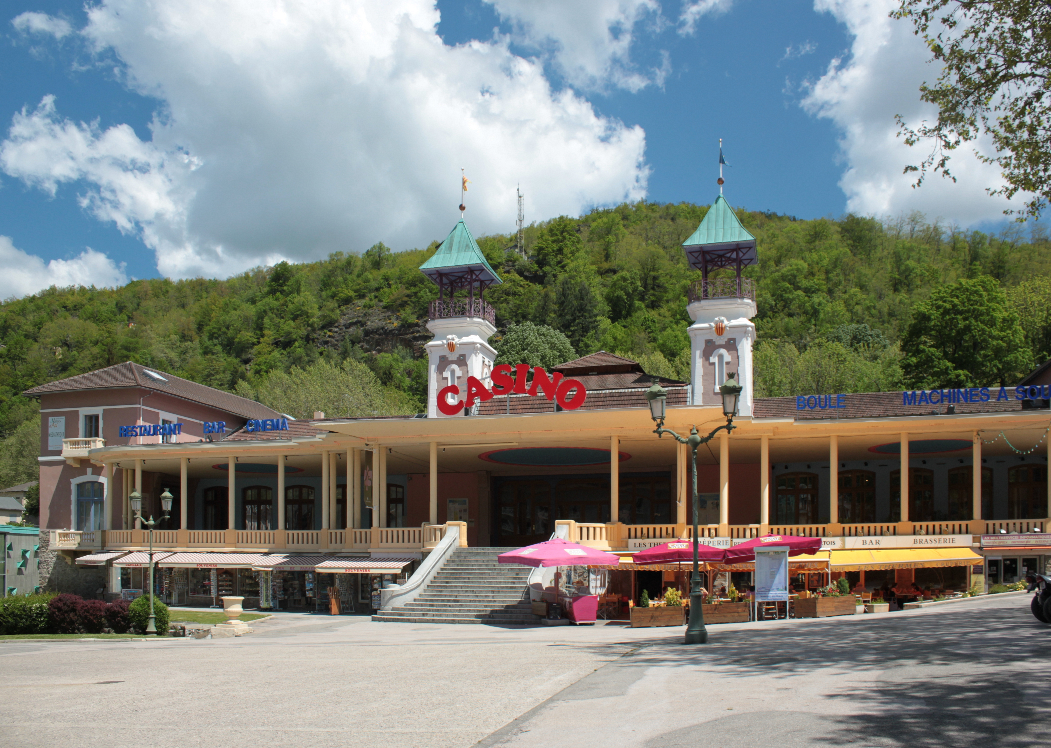 Casino, Fr-09-Ax-les-Thermes.